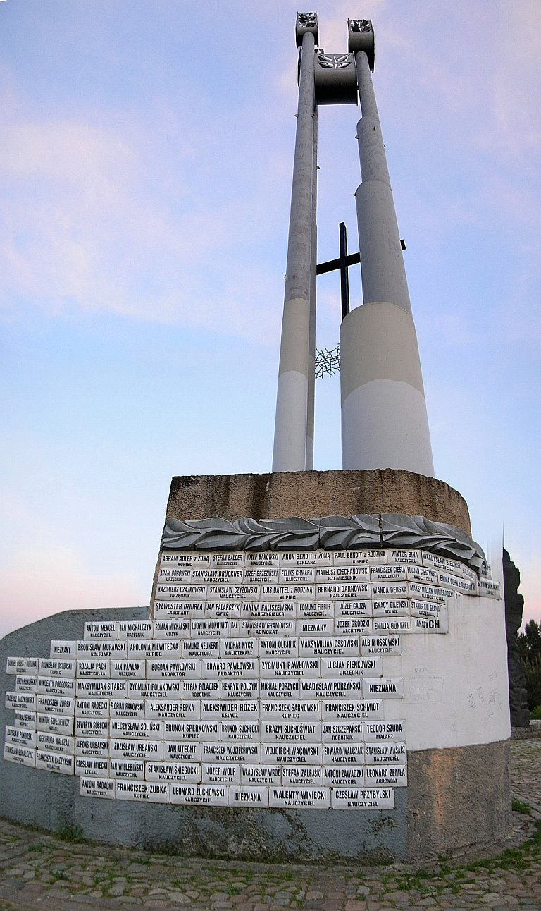 Pomnik w Dolinie Śmierci w Bydgoszczy